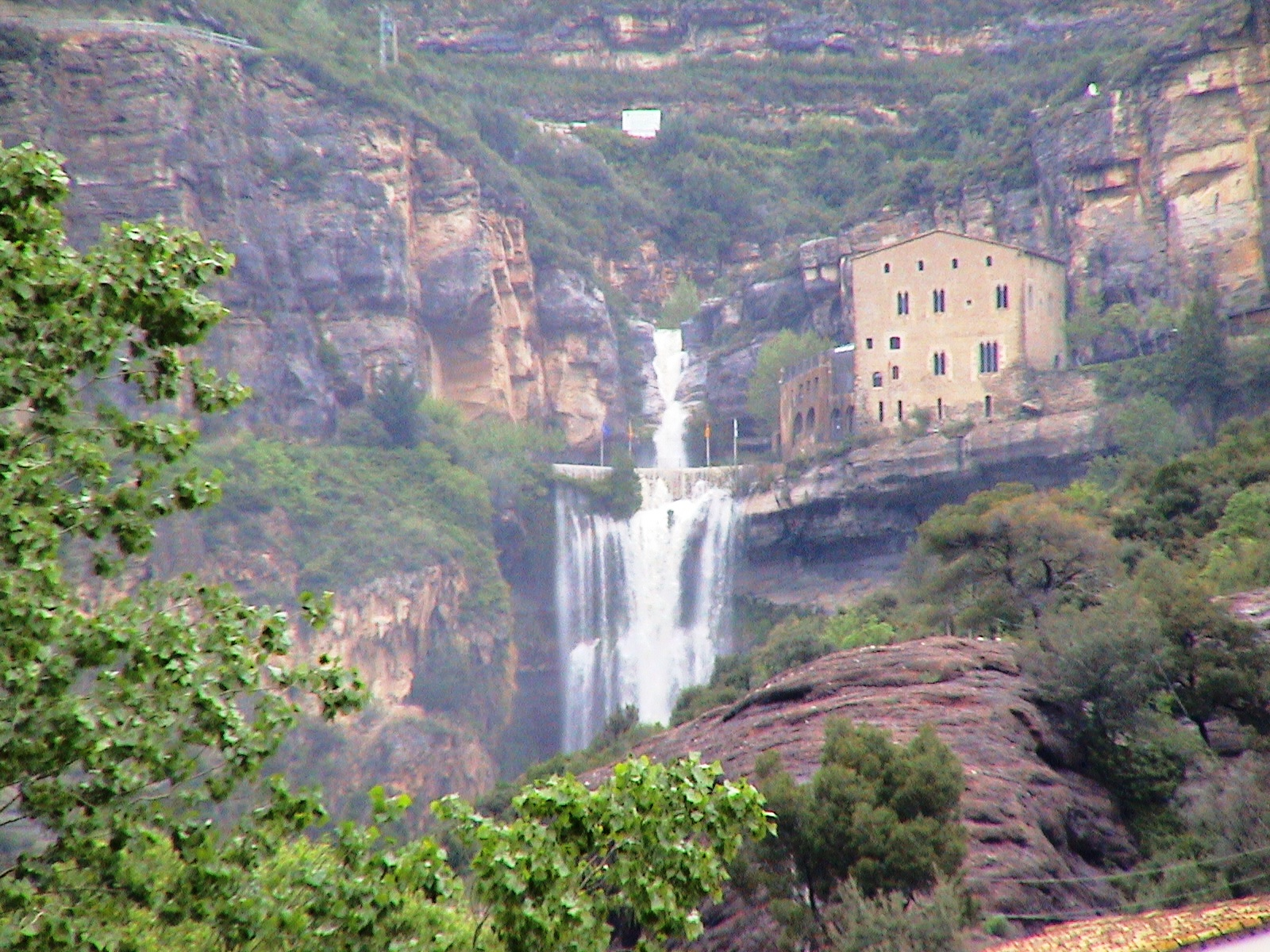 Sant Miquel del Fai (Riells del Fai, Bigues i Riells, Vallès Oriental)